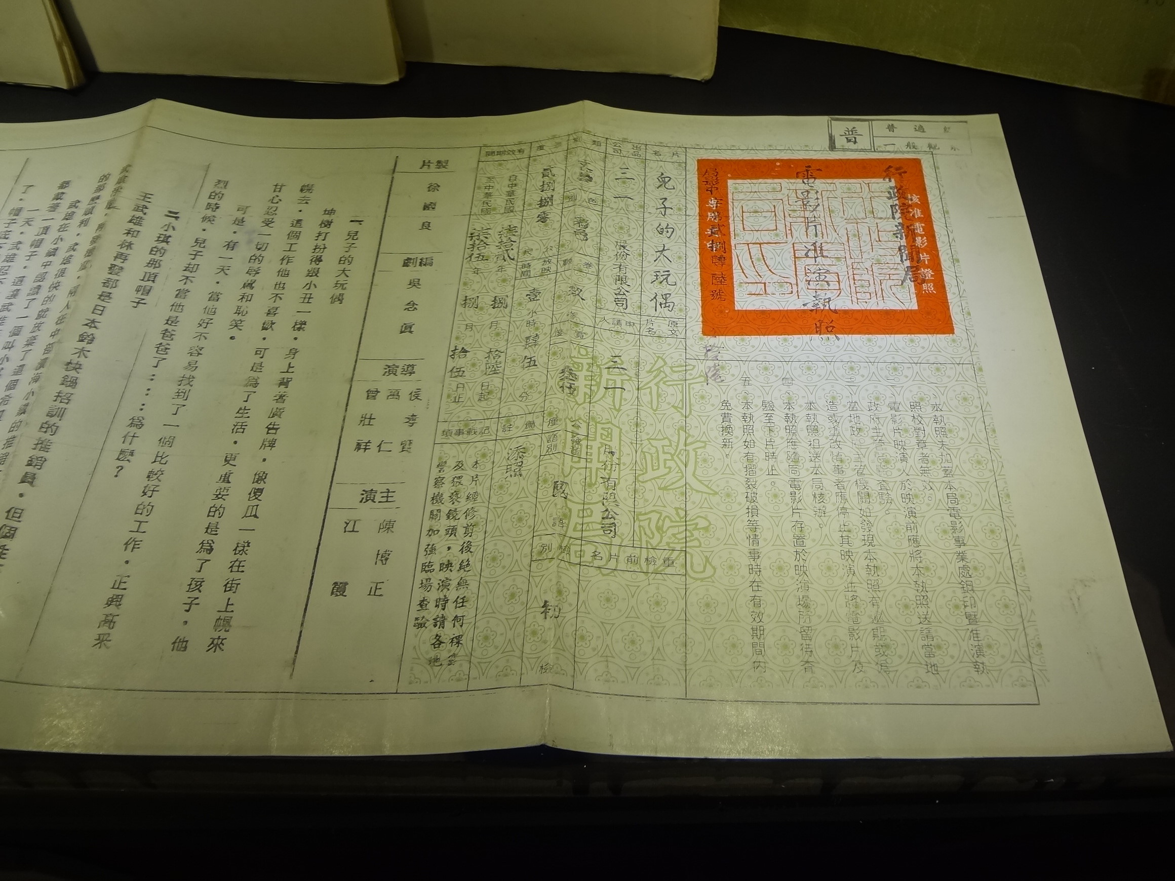 1983年（中華民國72年）8月16日，行政院新聞局發給電影《兒子的大玩偶》的電影片准演執照。